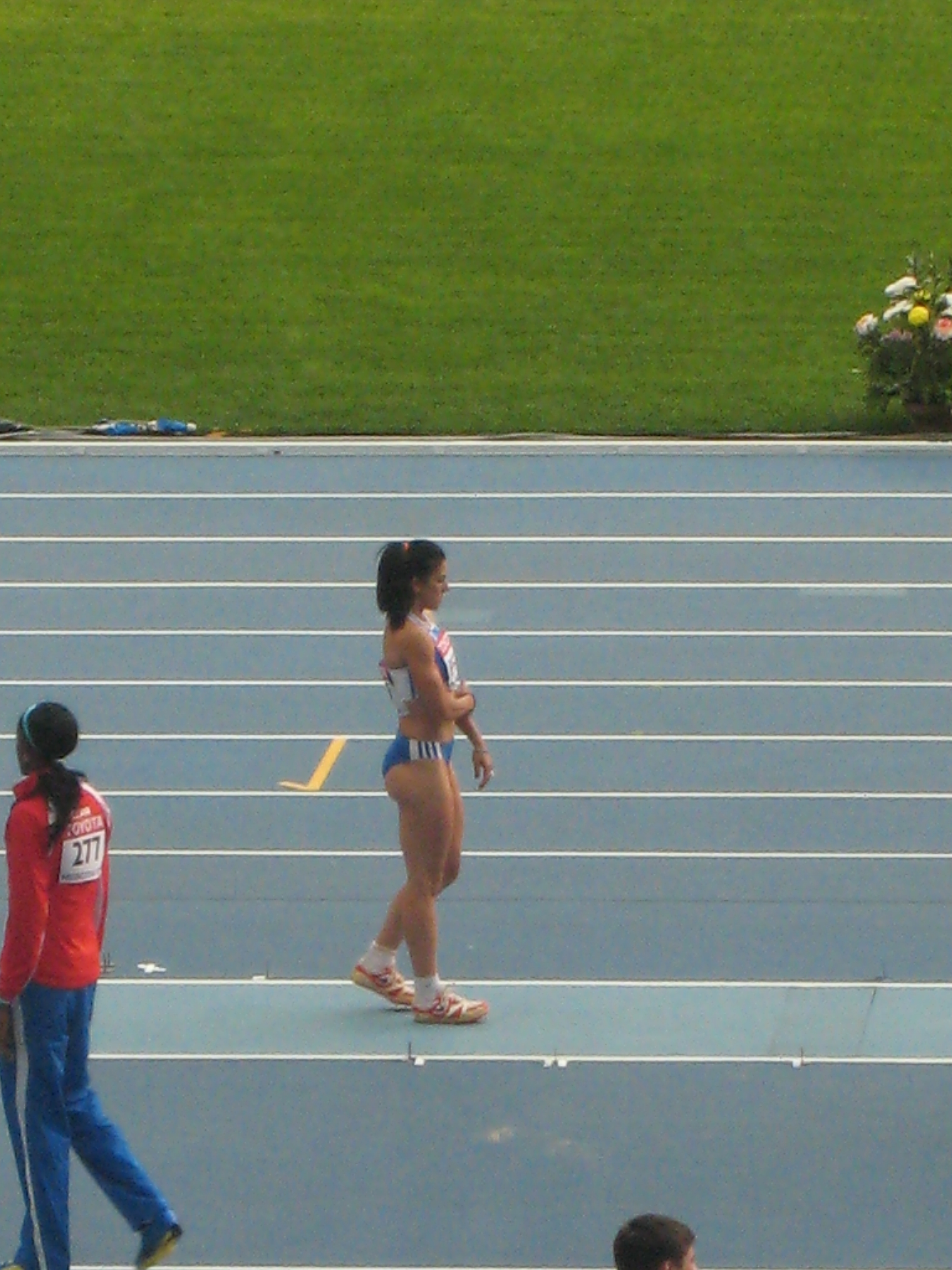 Чемпионат мира по лёгкой атлетике 2013. Греческая спортсменка Атанасия Перра